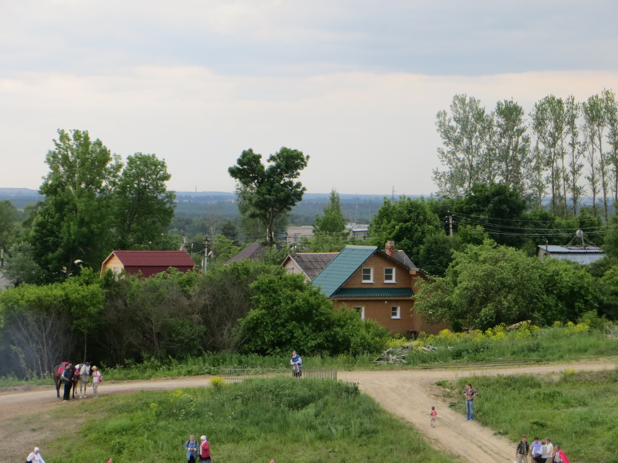 Деревня Ретселя. 2015 г.